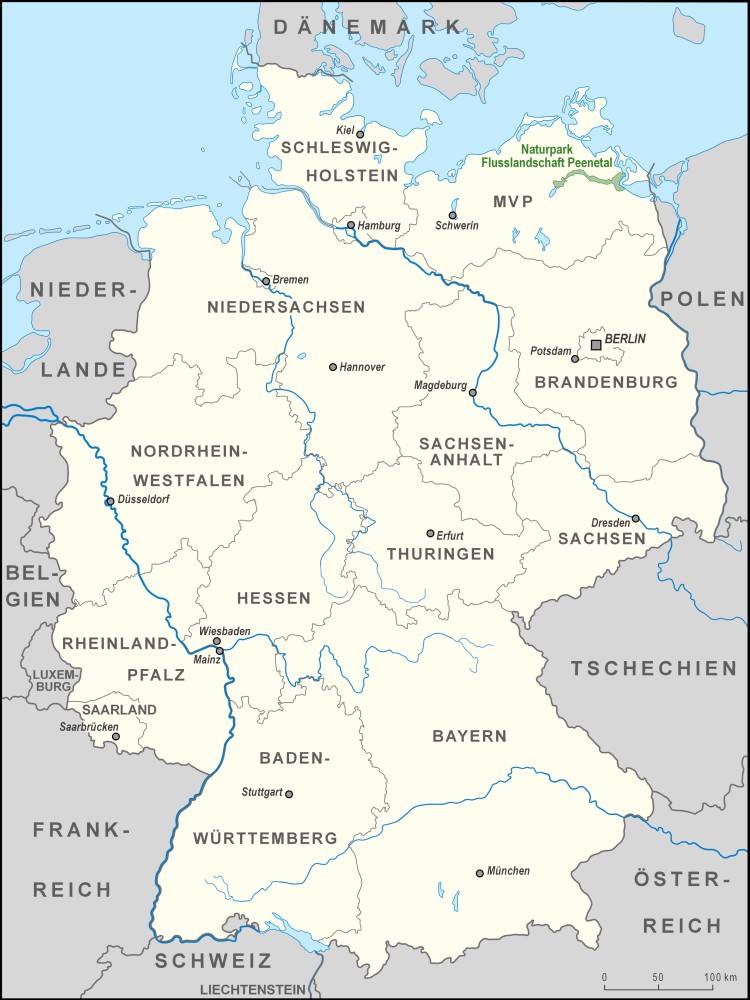 Karte des Naturparks Flusslandschaft Peenetal in Deutschland